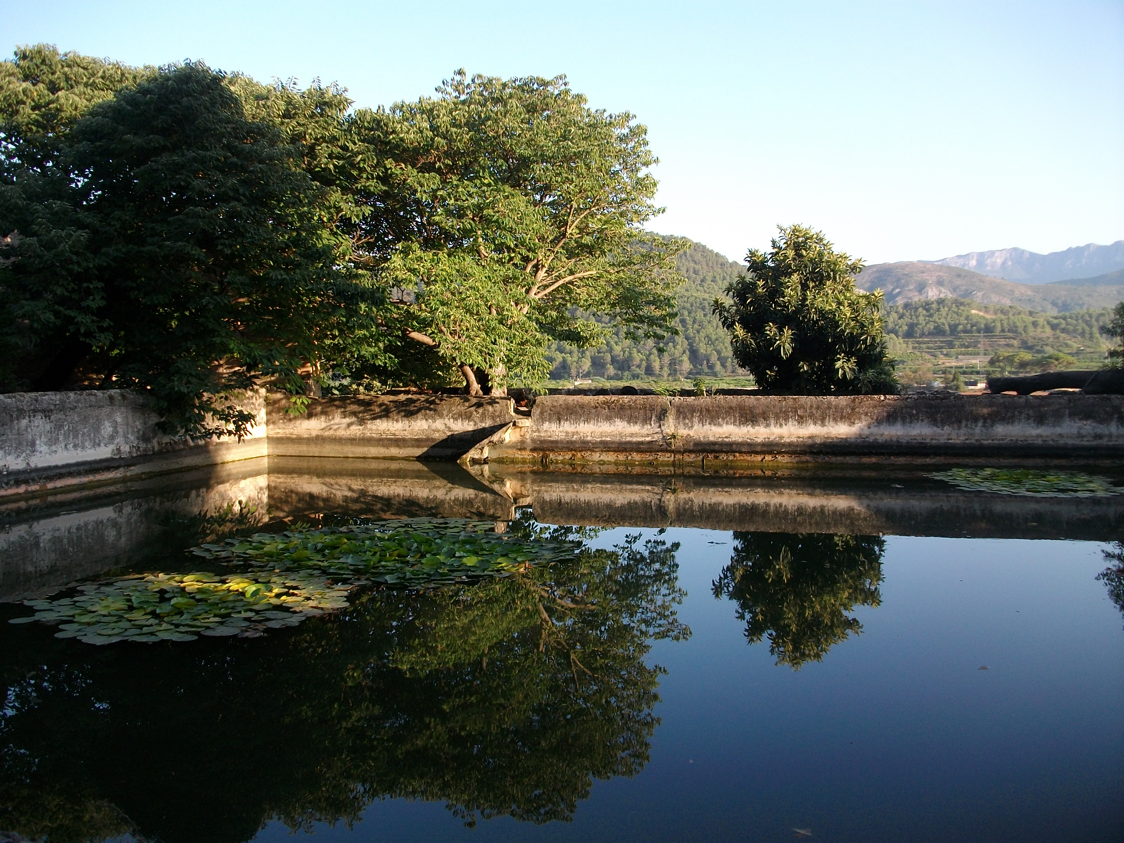 Bassa per al reg al monestir de Cotalba.